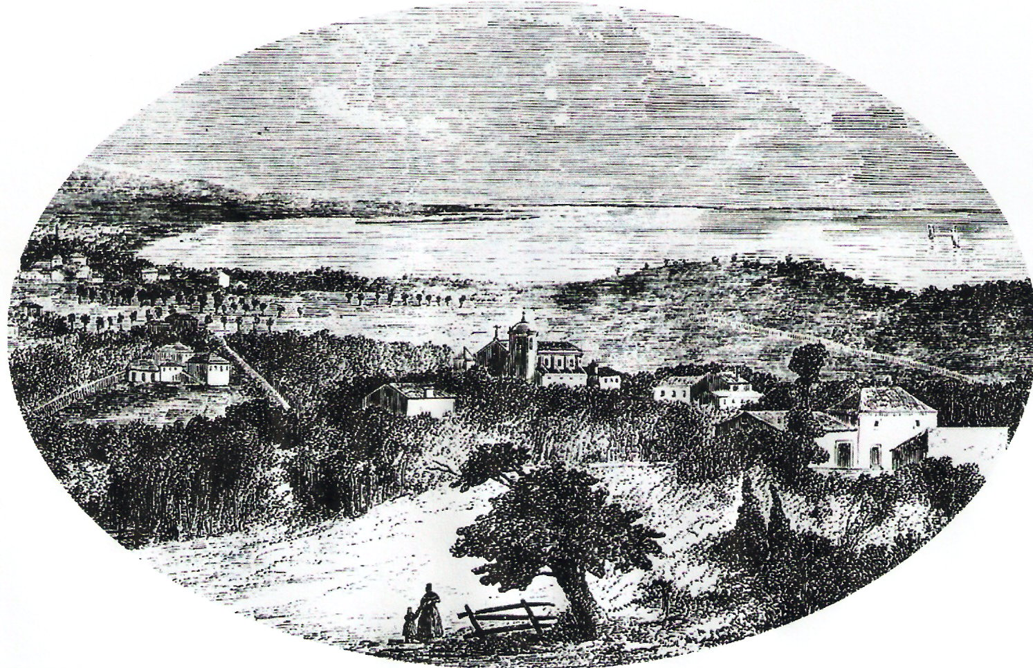 Antiga gravura da Vila dos Olivais (séc. XIV)